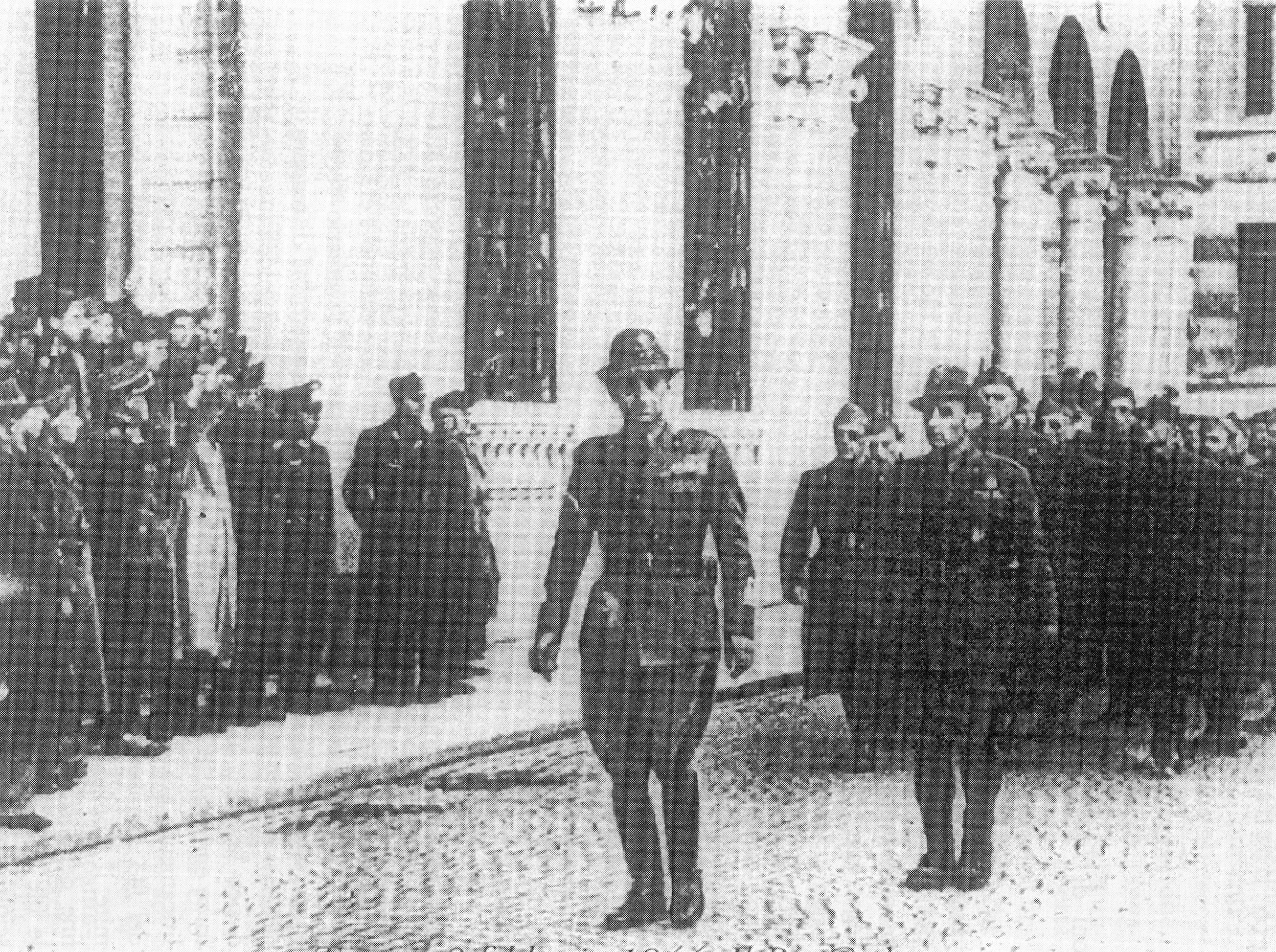 Il tenente colonnello Renato Perico alla testa del btg Cadore 1944 a Treviso.